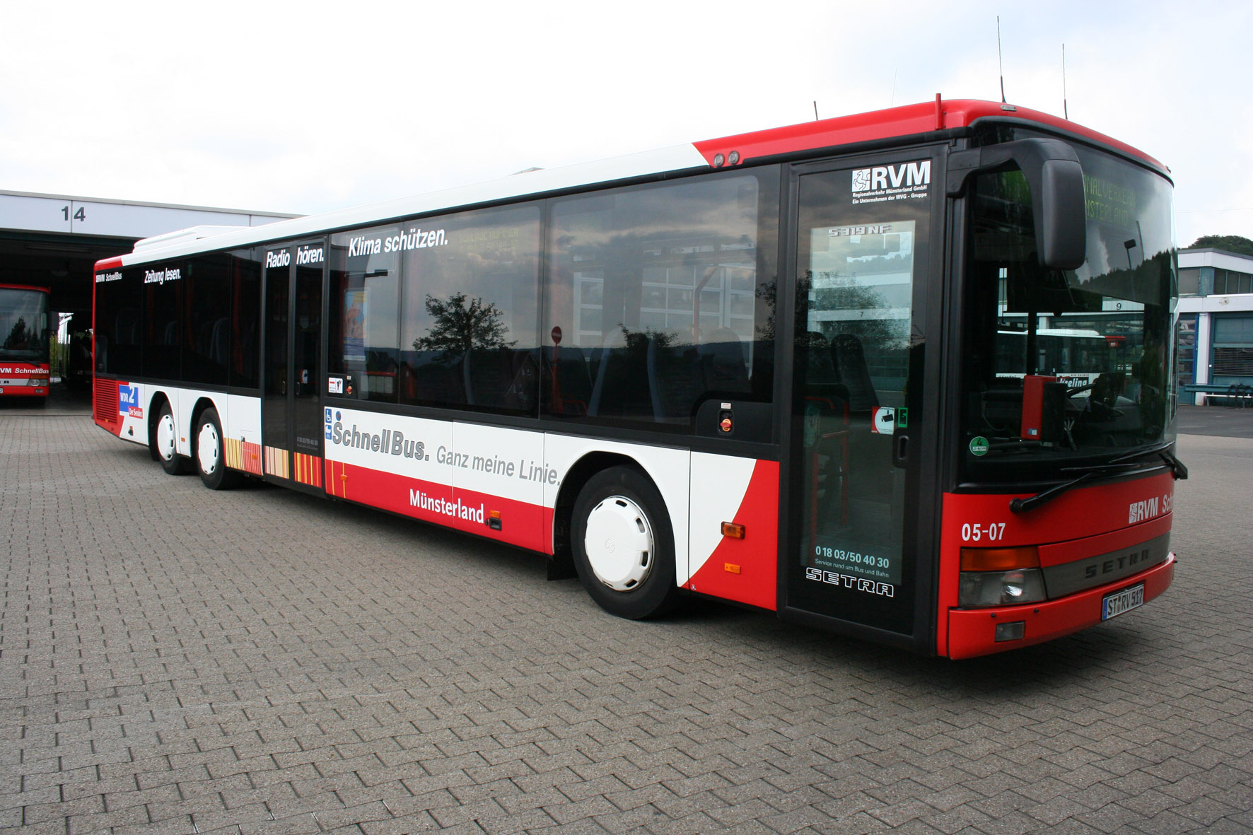 Setra S 319 NF - SchnellBus der RVM im Münsterland-Design